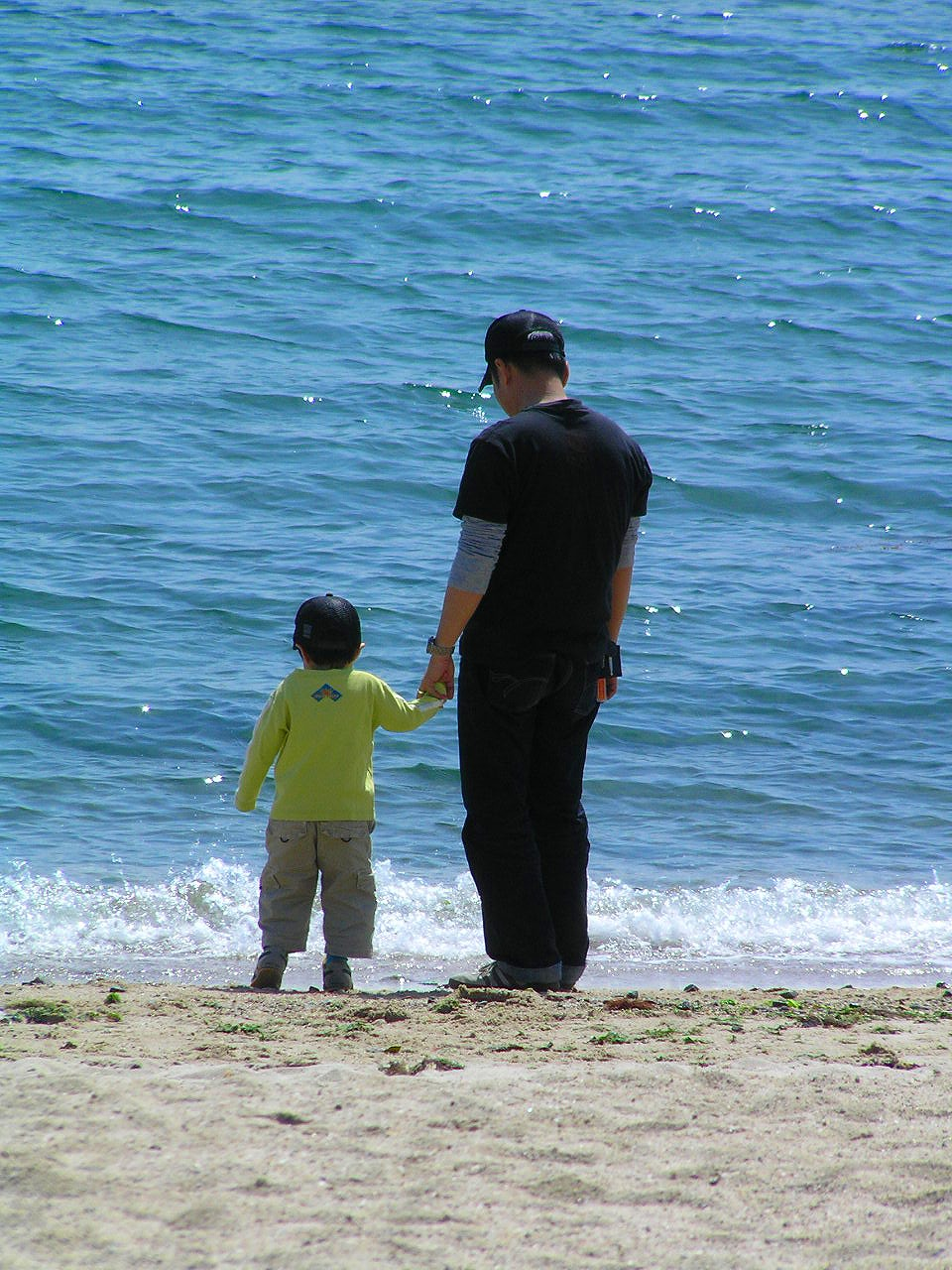 海辺の親子 明石市大蔵海岸にて